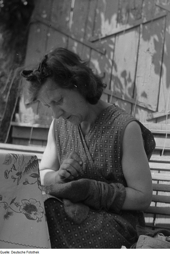 Original image description from the Deutsche Fotothek Mutter Roger Rössings beim Stopfen einer Socke